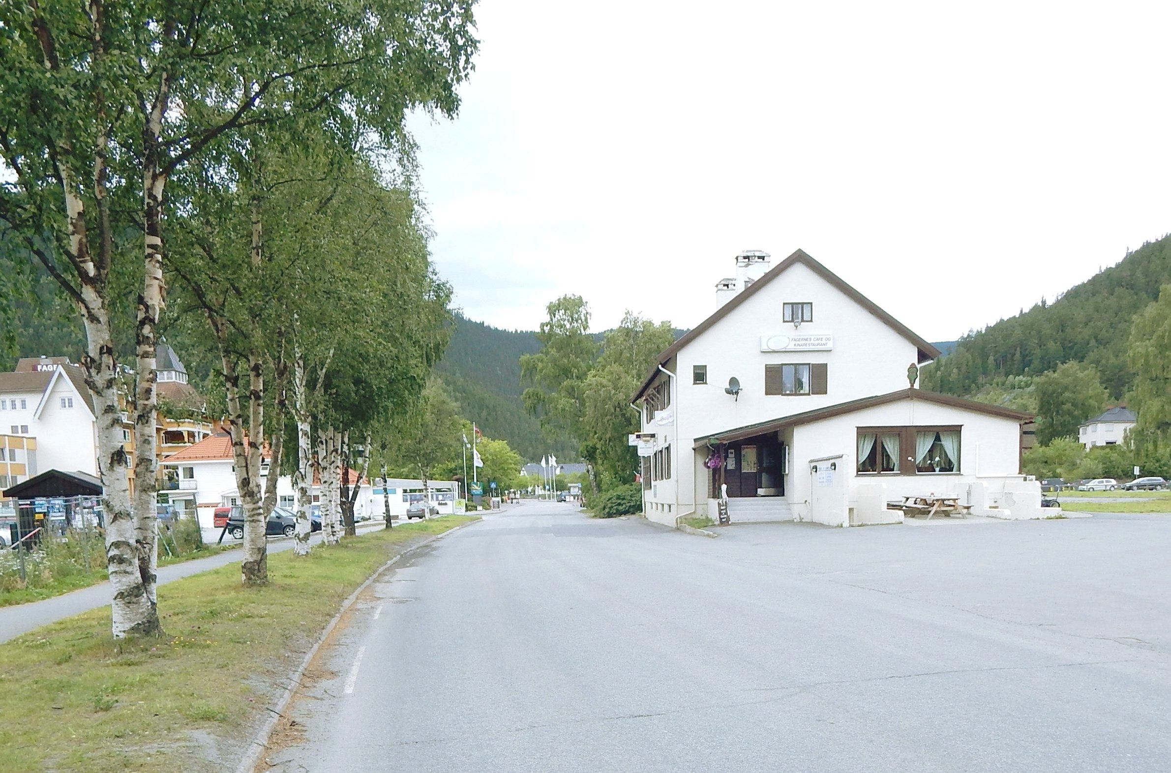 Jernbanevegen på Fagernes er fylkesvei 2496 (tidl. 274).